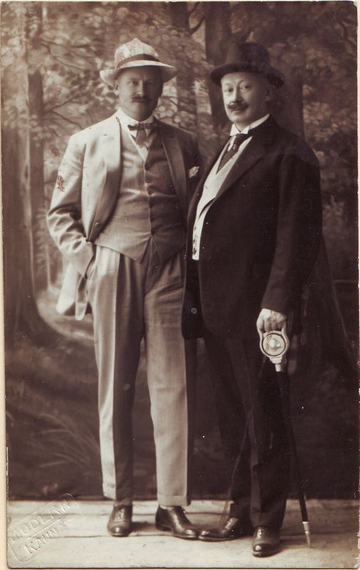 Broliai Mikas (dešinėje) ir Kipras Petrauskai. Mikas Petrauskas (1873 m. spalio 13 d. Palūšėje, Daugėliškio valsčius, Rusijos imperija – 1937 m. kovo 23 d. Kaune) – vargonininkas, dainininkas (tenoras), dirigentas, pedagogas, kompozitorius ir kultūros veikėjas. Kipras Petrauskas (1885 m. lapkričio 23 d. Ceikiniuose, Švenčionių apskritis, Rusijos imperija – 1968 m. sausio 17 d. Vilniuje) – žymus Lietuvos dainininkas (tenoras), operose sukūręs apie 80 vaidmenų, profesorius, Lietuvos meno kūrėjų draugijos narys.